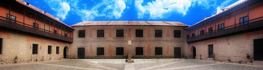 Segundo patio de la Casa de Moneda en Potosí, Bolivia.